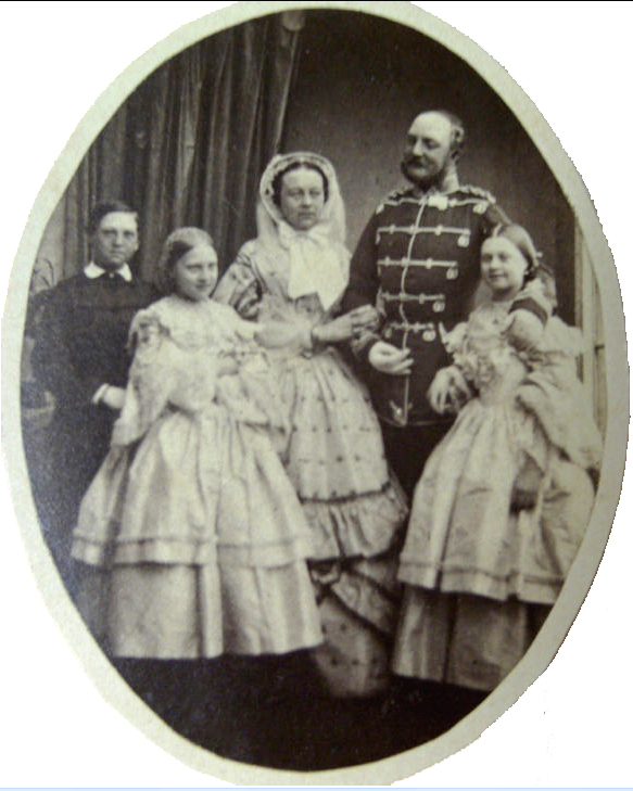 Eugen Lulves fertigte eines der seltenen Fotos des blinden Königs „Georg V. im Kreise seiner Familie“.